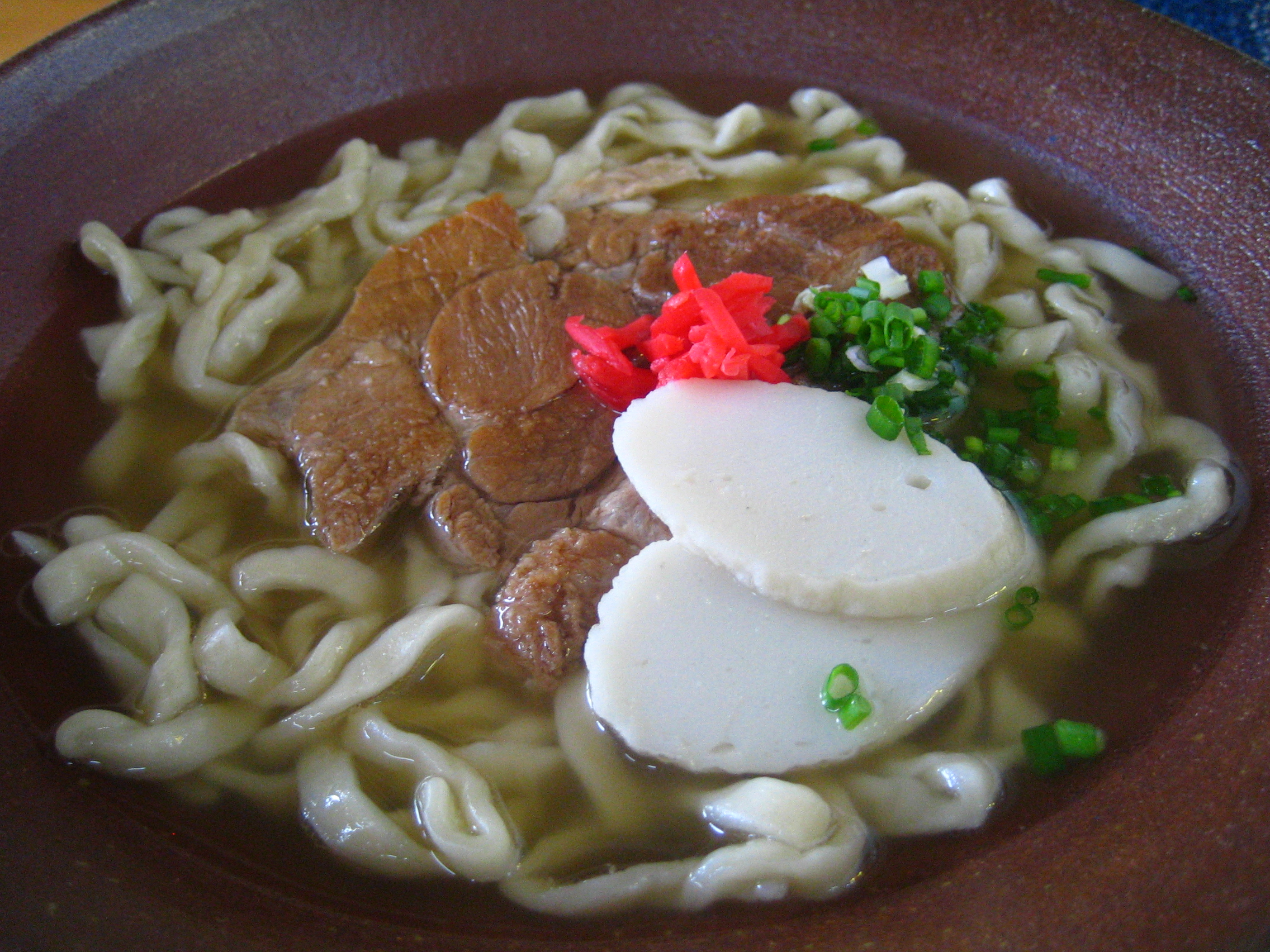 at Ten to Ten, an okinawan noodle restaurant, in Naha, Okinawa